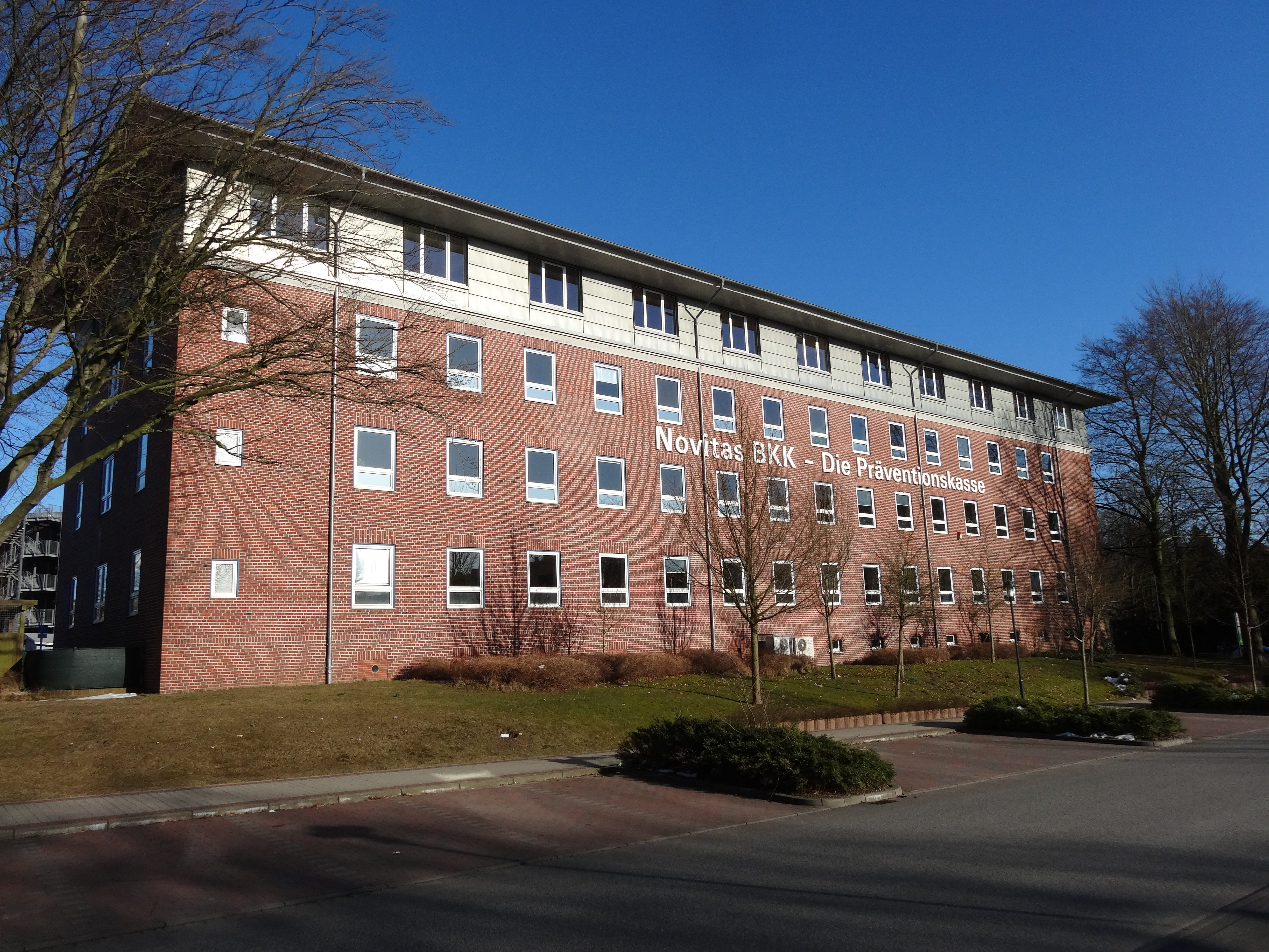 Verwaltung der Novitas BKK in Itzehoe. Eines der letzten (umgebauten) Gebäude der ehemaligen "Hanseaten-Kaserne Itzehoe"